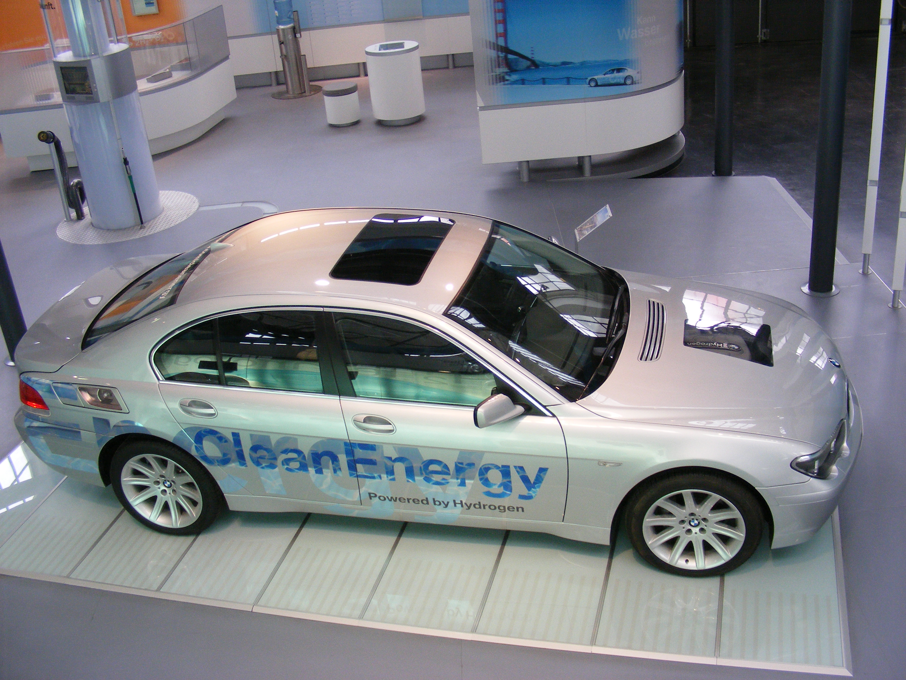 BMW der 7er Serie (Bj. 20??, Typ E??) mit Wasserstoffantrieb ("CleanEnergy"), Exponat im Deutschen Museum Verkehrszentrum - Halle 3.